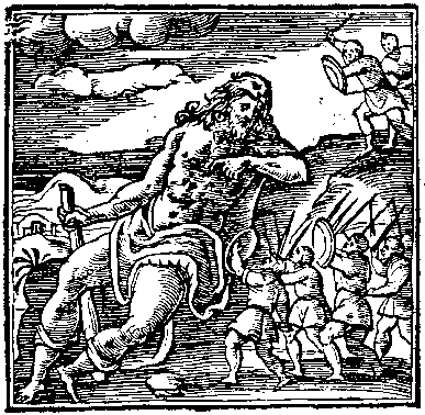 Emblem from a book of emblems (Alciato's Emblema)- Emblème d'Alciat Livre d'emblèmes